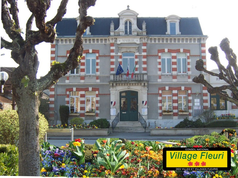 Village fleuri situé en Champagne, à 20kms au nord de Reims.